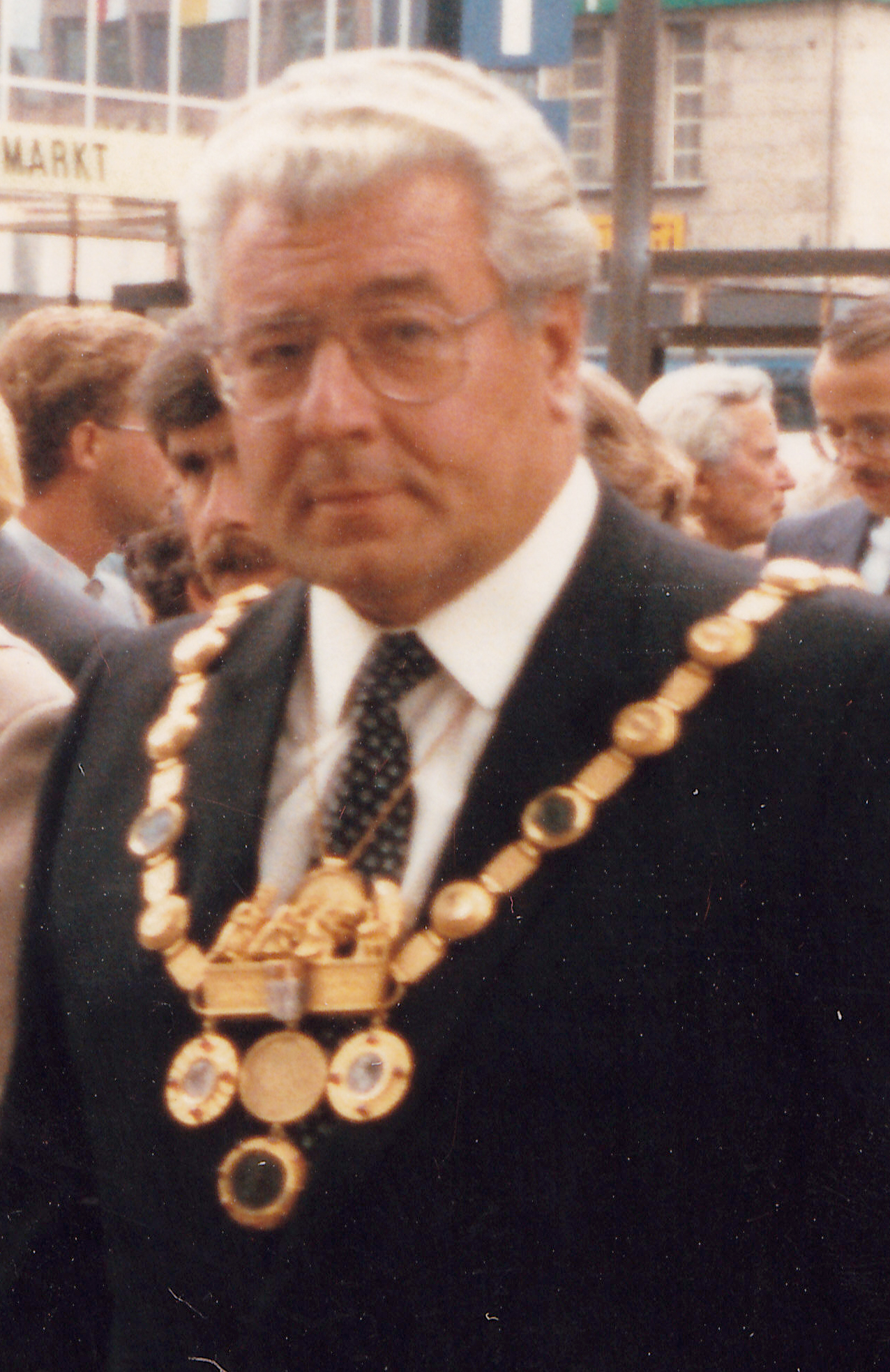 Norbert Burger, Oberbürgermeister der Stadt Köln, mit Amtskette, 1987, am Kölner Neumarkt